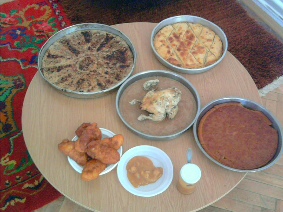 Ushqime nga kulinaria e pasur tropojane si: Flia e Tropojes, Byrek me pete, Qervish pule, Ravani, petulla dhe mjalte.